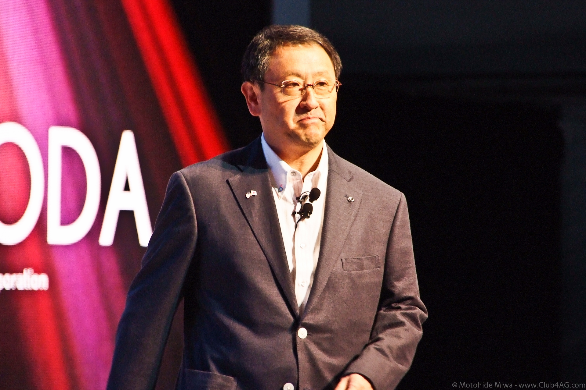 Mr. Akio Toyoda